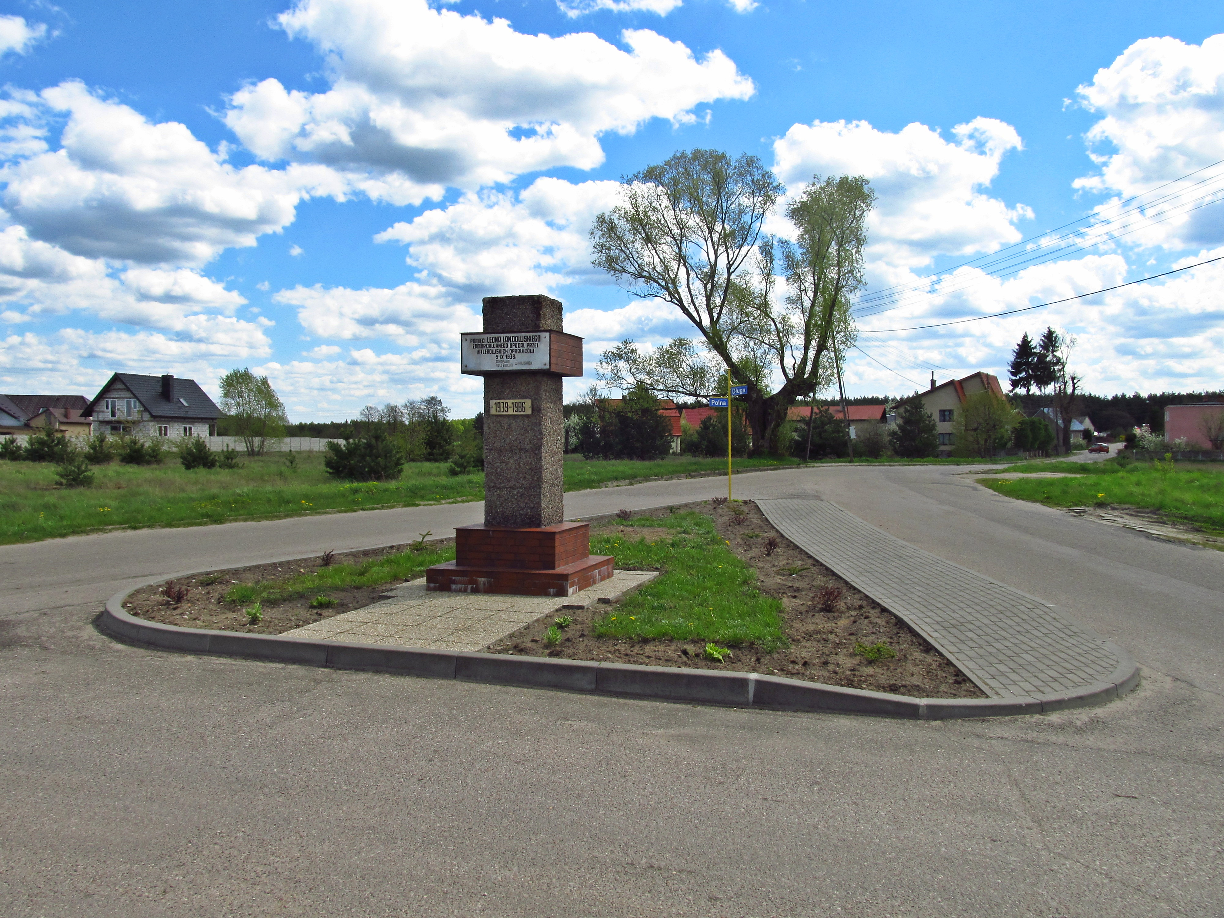 Pomnik pamięci Leona Landowskiego zamordowanego przez hitlerowców w dniu 9 września 1939 roku w pobliżu tego miejsca.